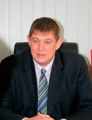 Гребнев Олег Геннадьевич